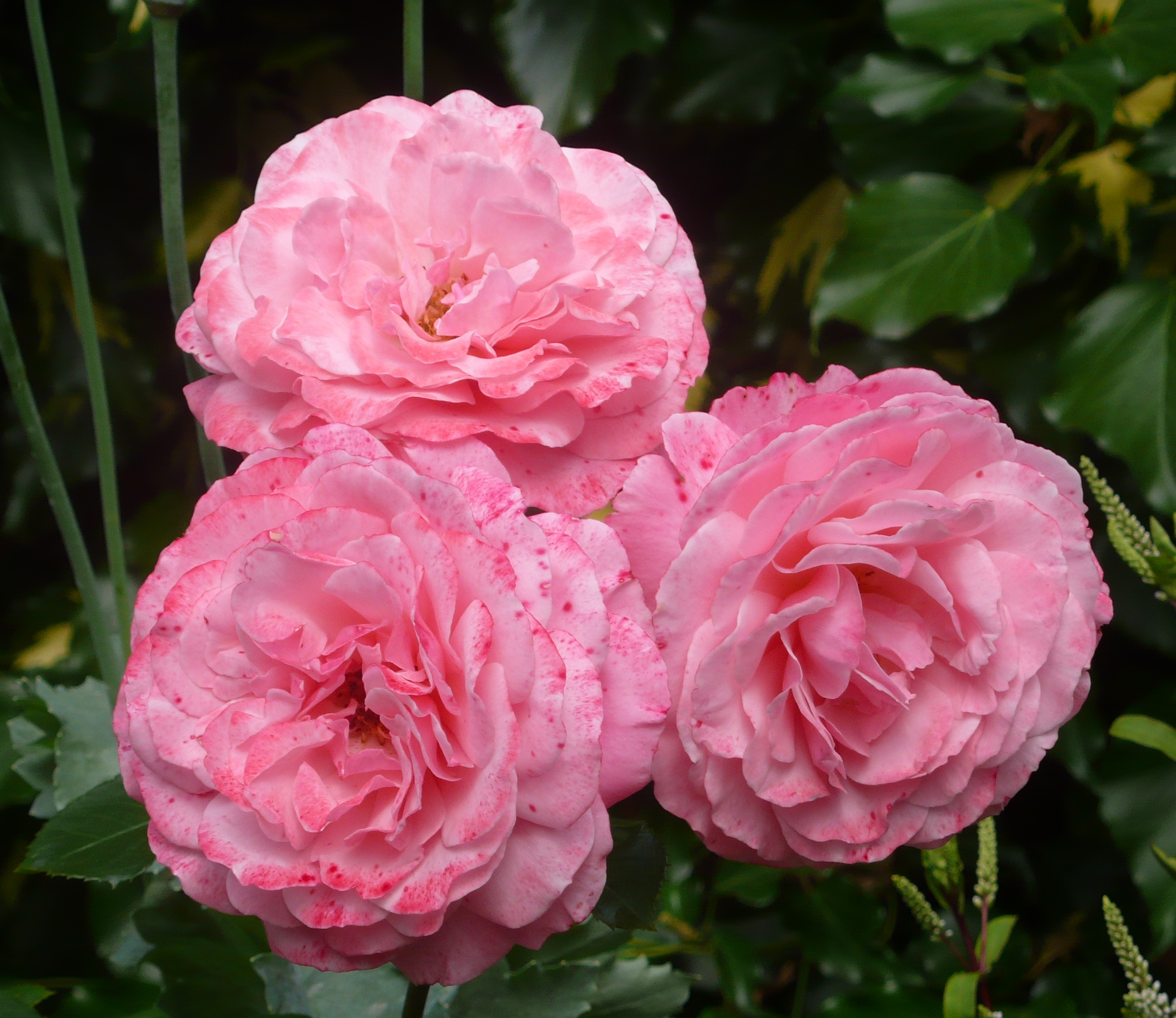 Rosa 'Sexy Rexy'